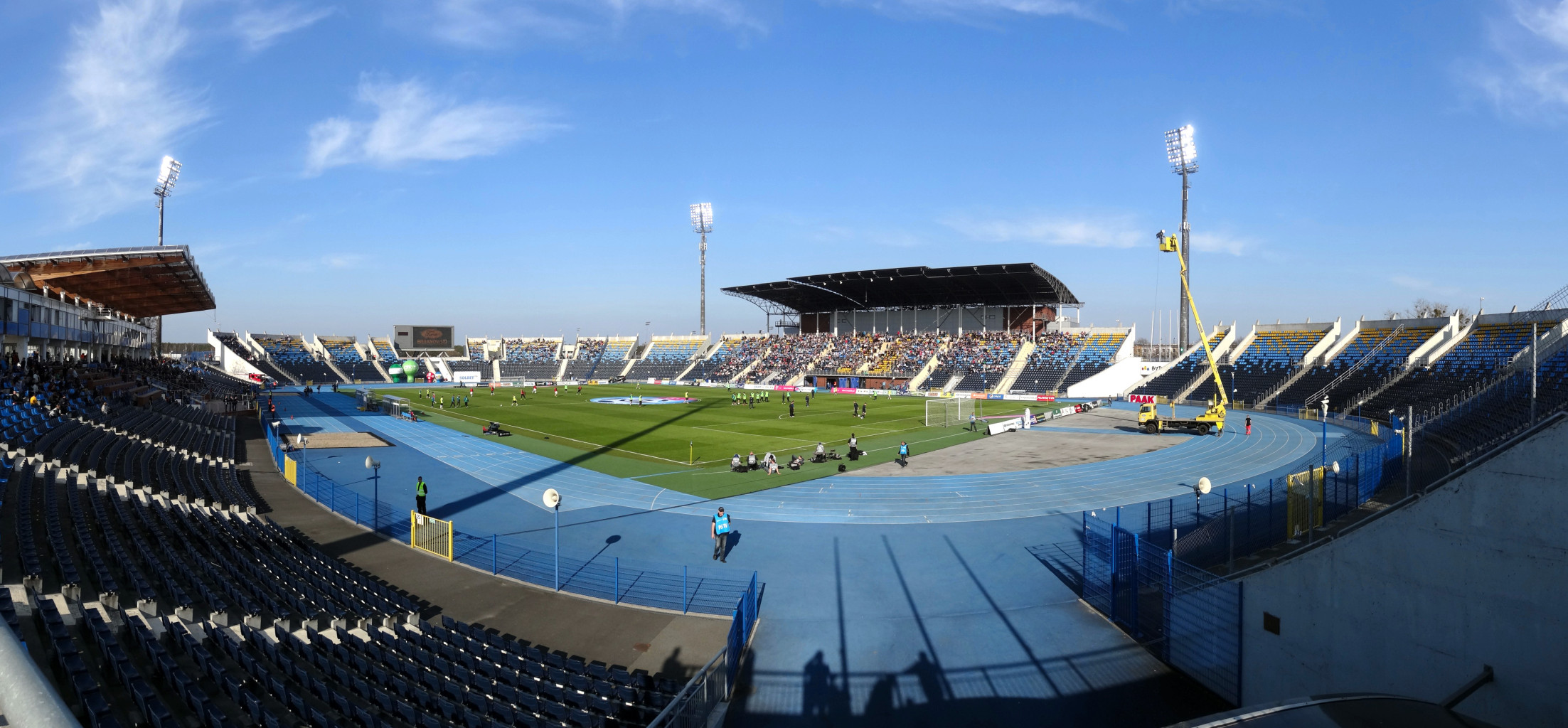 Stadion Zawiszy Bydgoszcz podczas przerwy w meczu ze Śląskiem Wrocław 30 marca 2014 roku